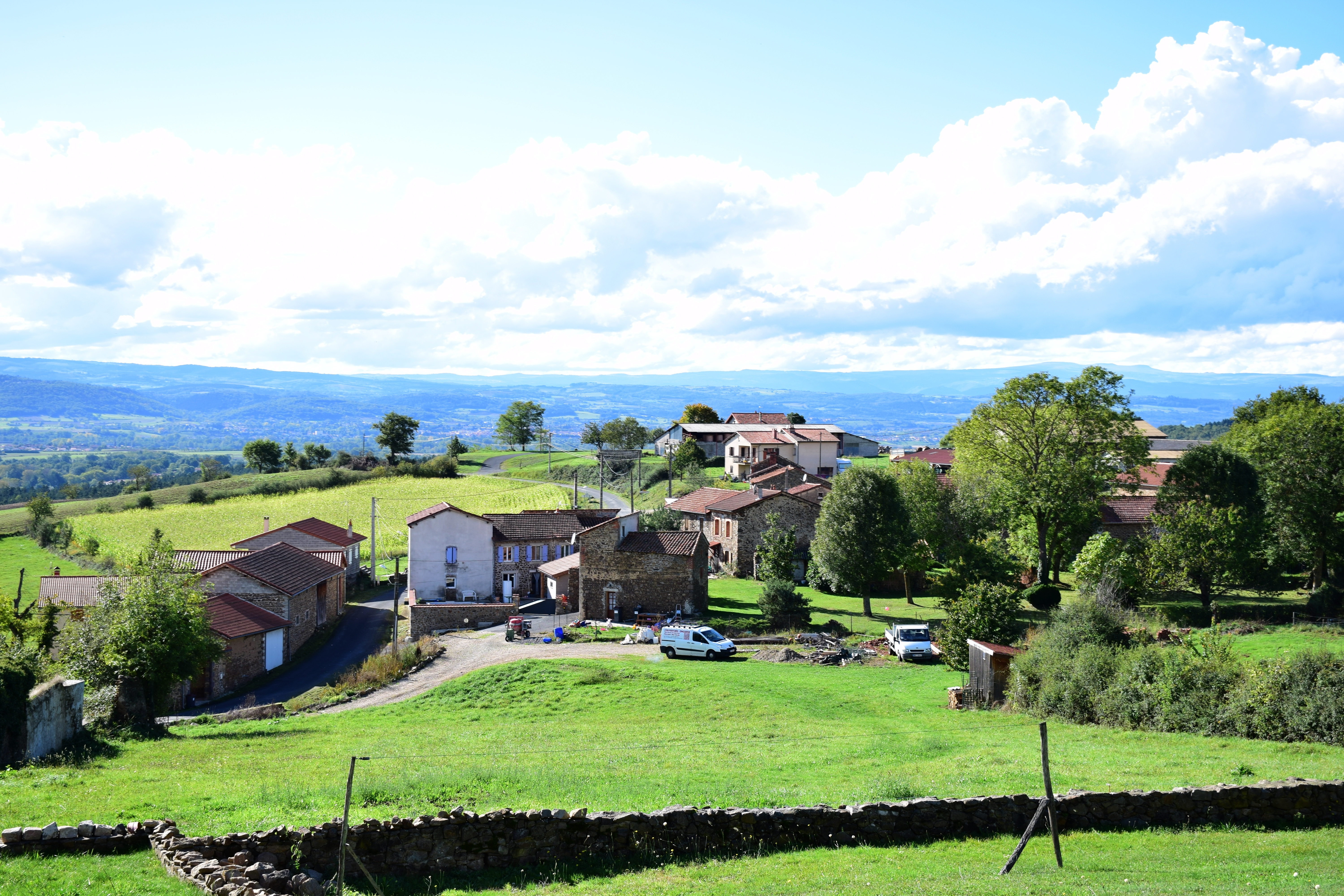 Le lieu-dit La Rochette, rattaché à la commune de Chaniat (Haute-Loire, France).